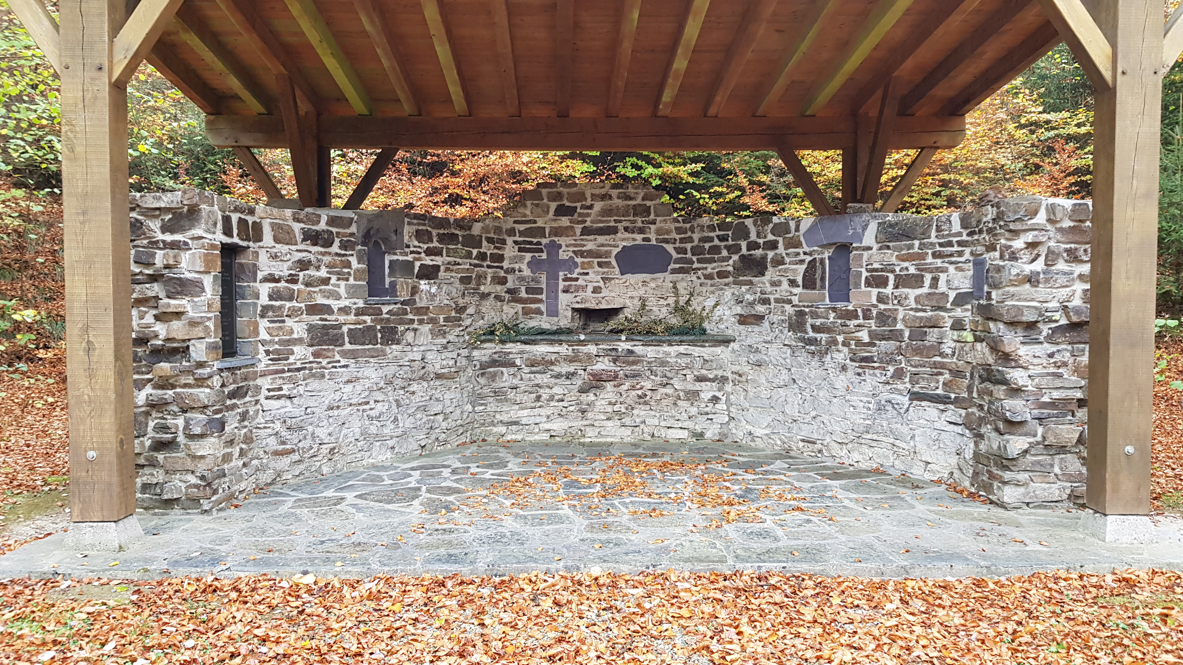 Ermitage von Meyerode, Amel, Belgien